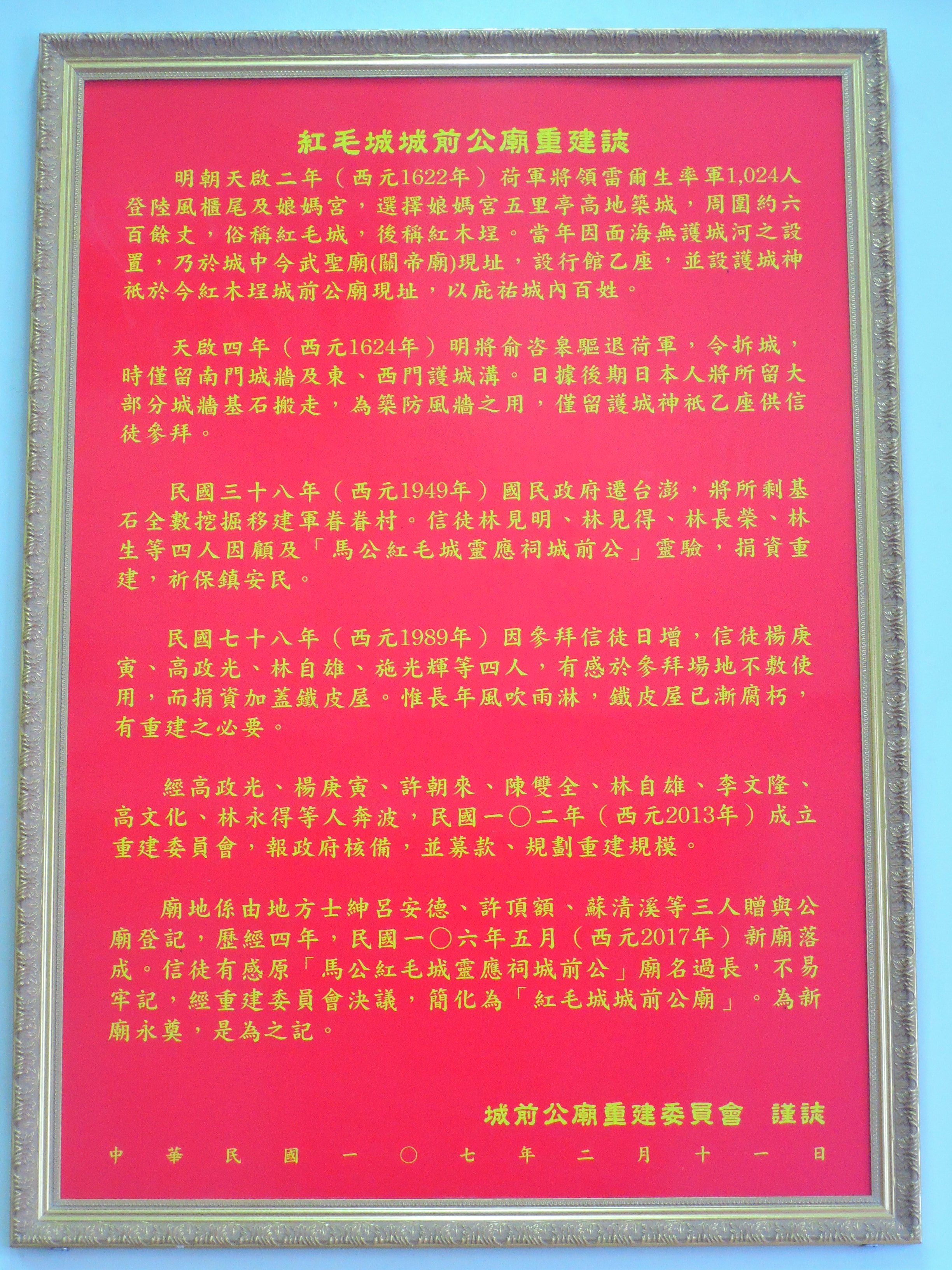 中文（台灣）: 又稱靈應祠，馬公市朝陽里中華路207號旁